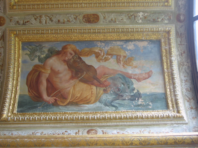 Salle de Bal